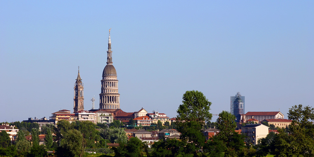 Panorama della città di Novara con la cupola di San Gaudenzio (a sinistra) ed il Duomo (a destra)